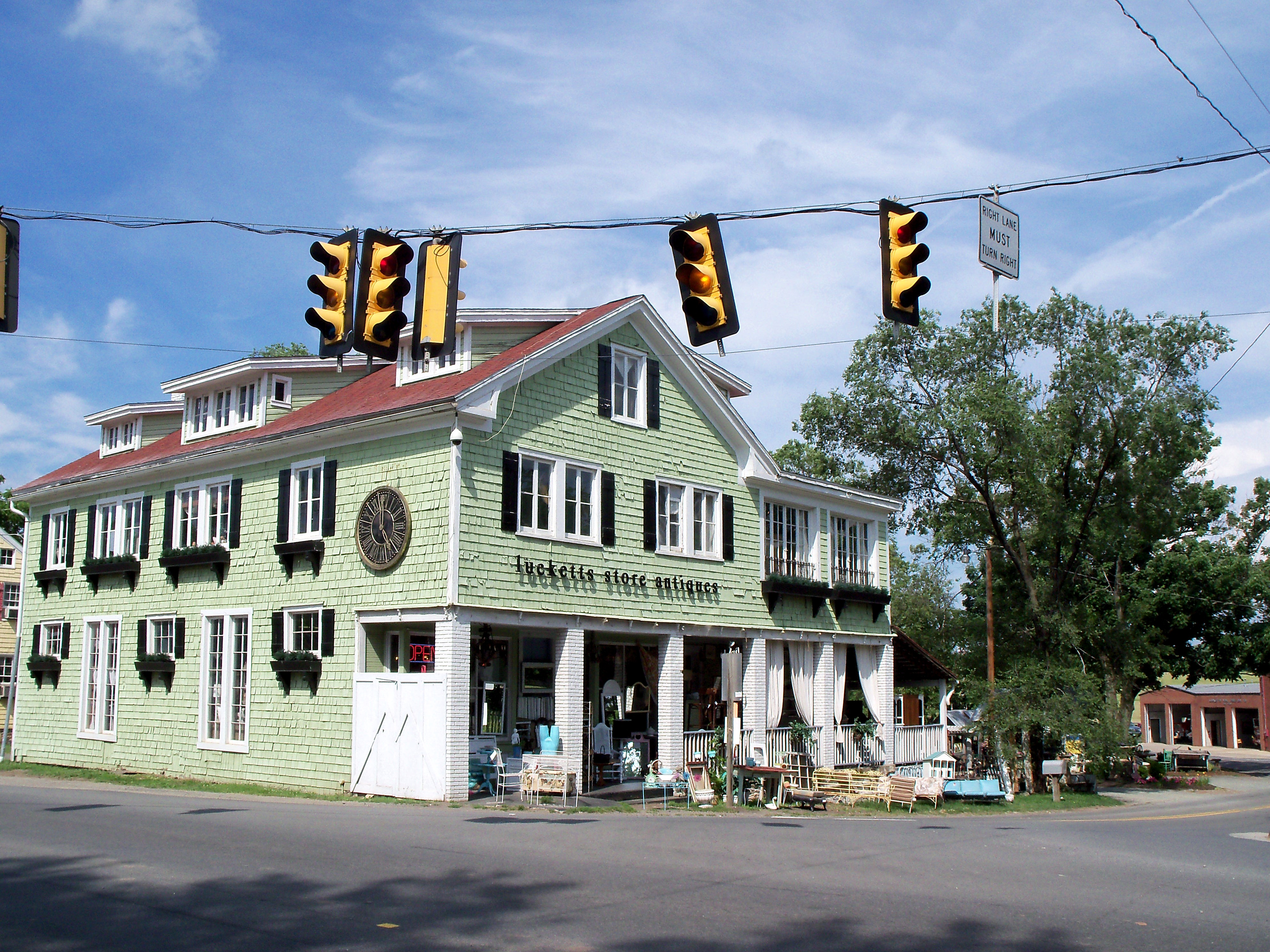 Lucketts Store Antiques